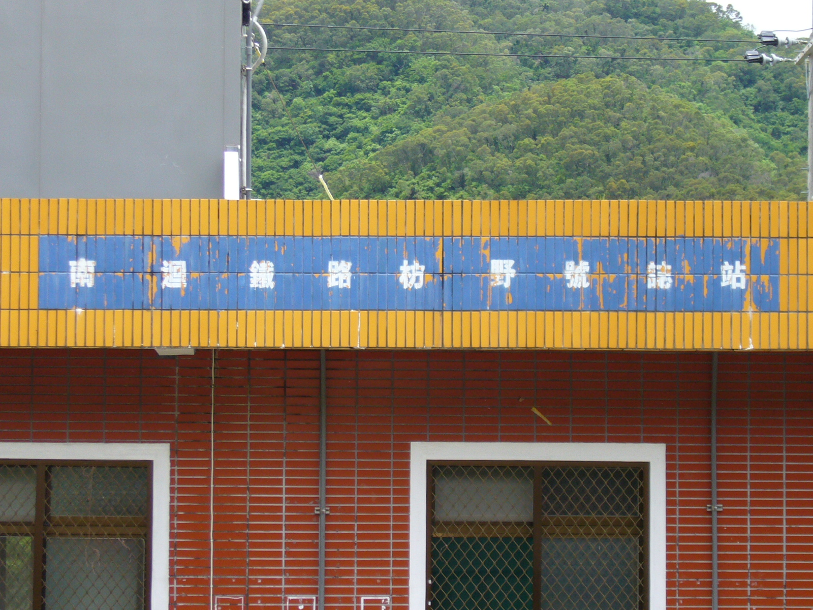 中文（台灣）: 於臺灣鐵路管理局自強號DR3054車上拍攝南迴鐵路枋野號誌站。